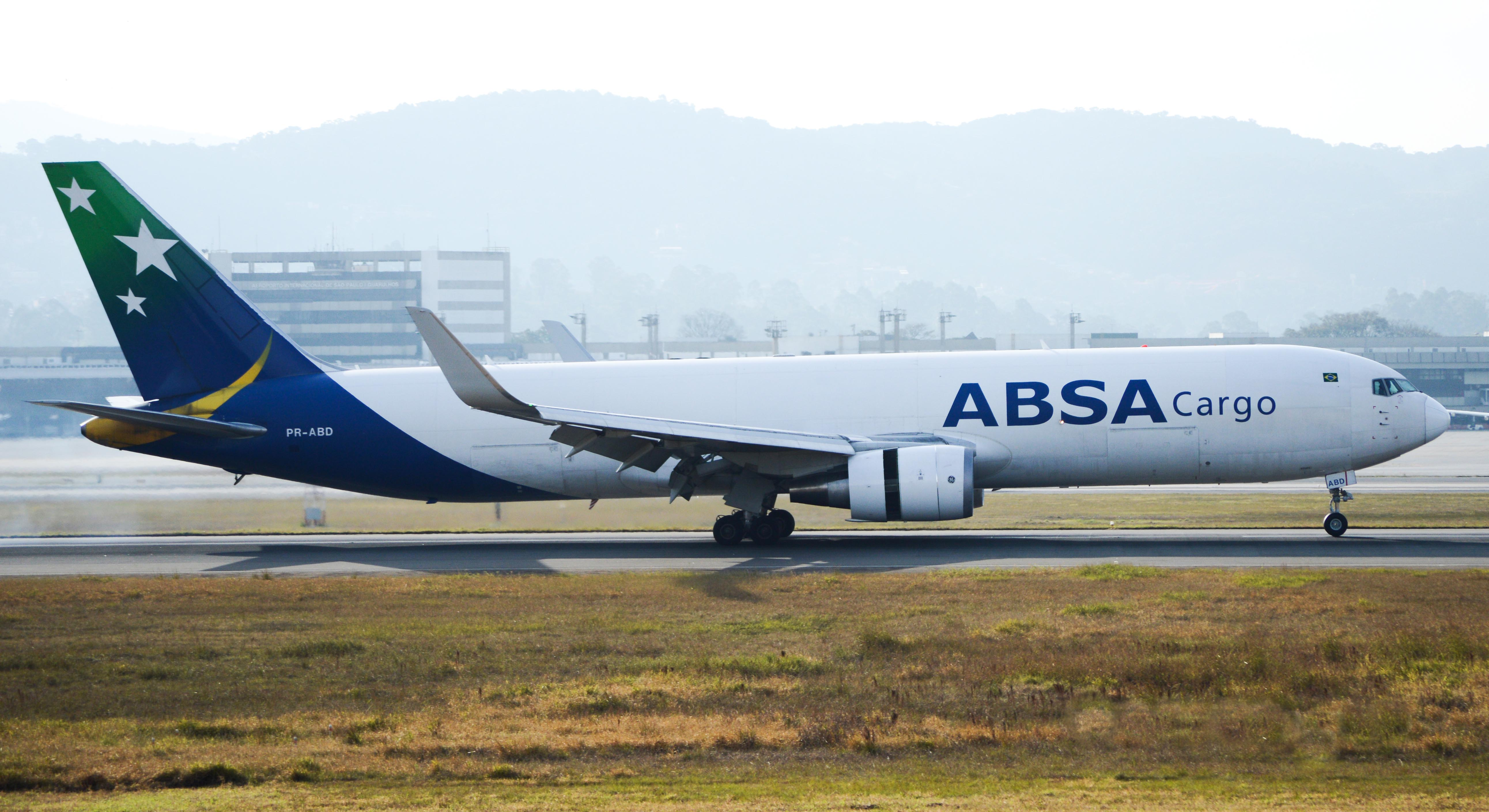 Avião da Latam Cargo pousando em no Aeroporto Internacional de Guarulhos (GRU).